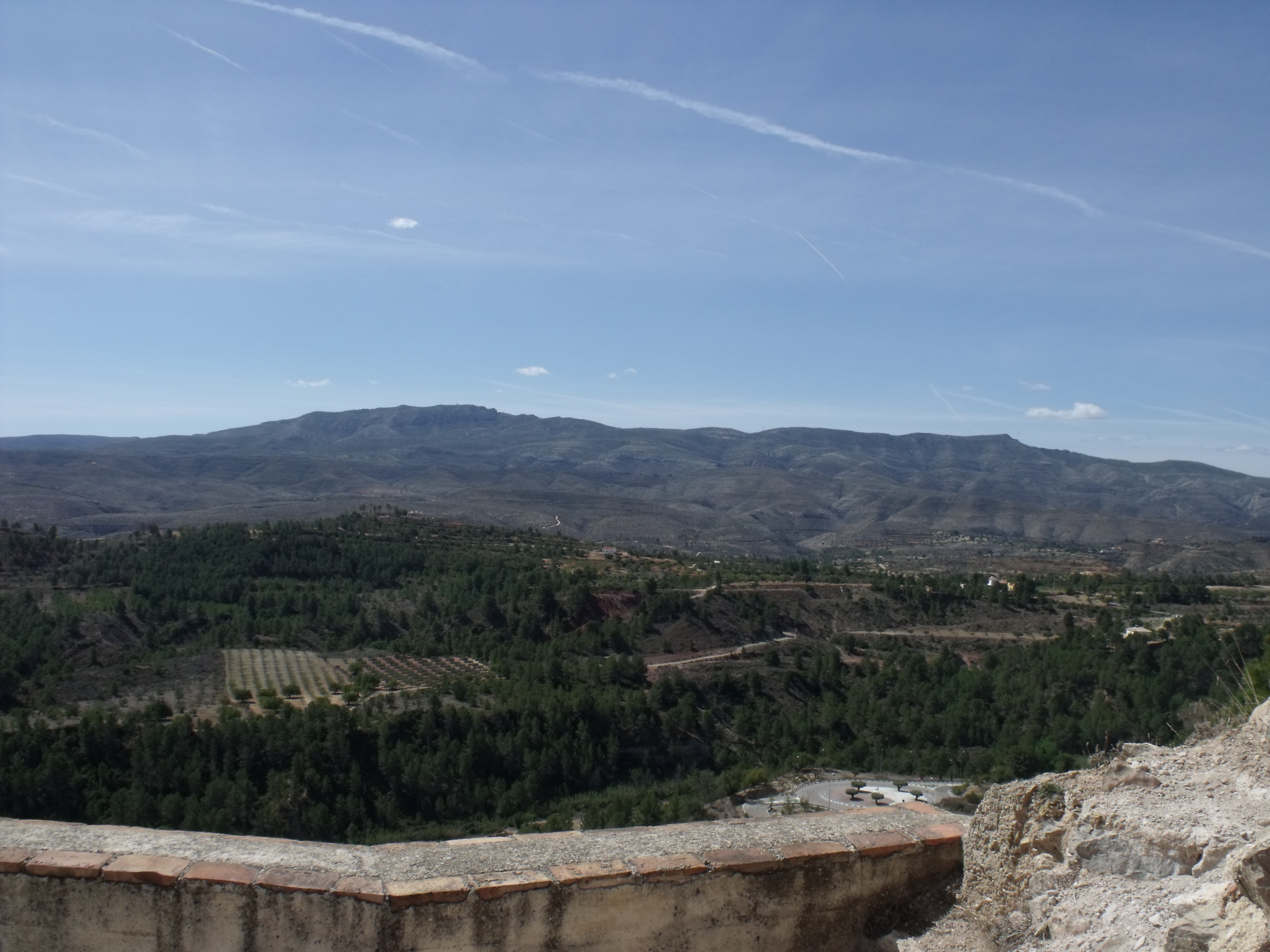 Castillo de Macastre: vista hacia el sur.